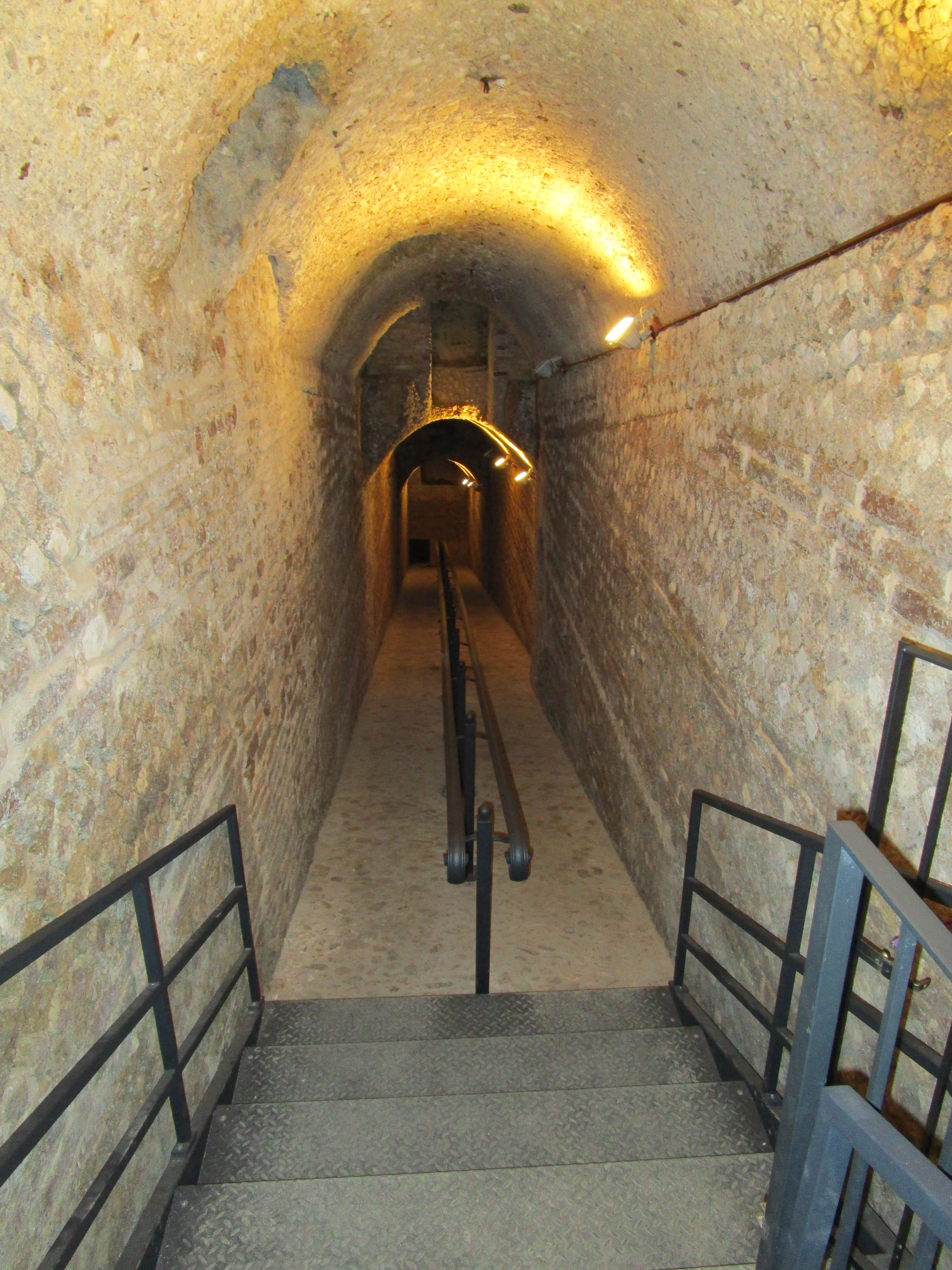 La Via Tecta di Chieti è un'antica galleria romana sotterranea dall'incerta funzione, che presenta una volta in opus coementicium e delle pareti in opus mixtum.